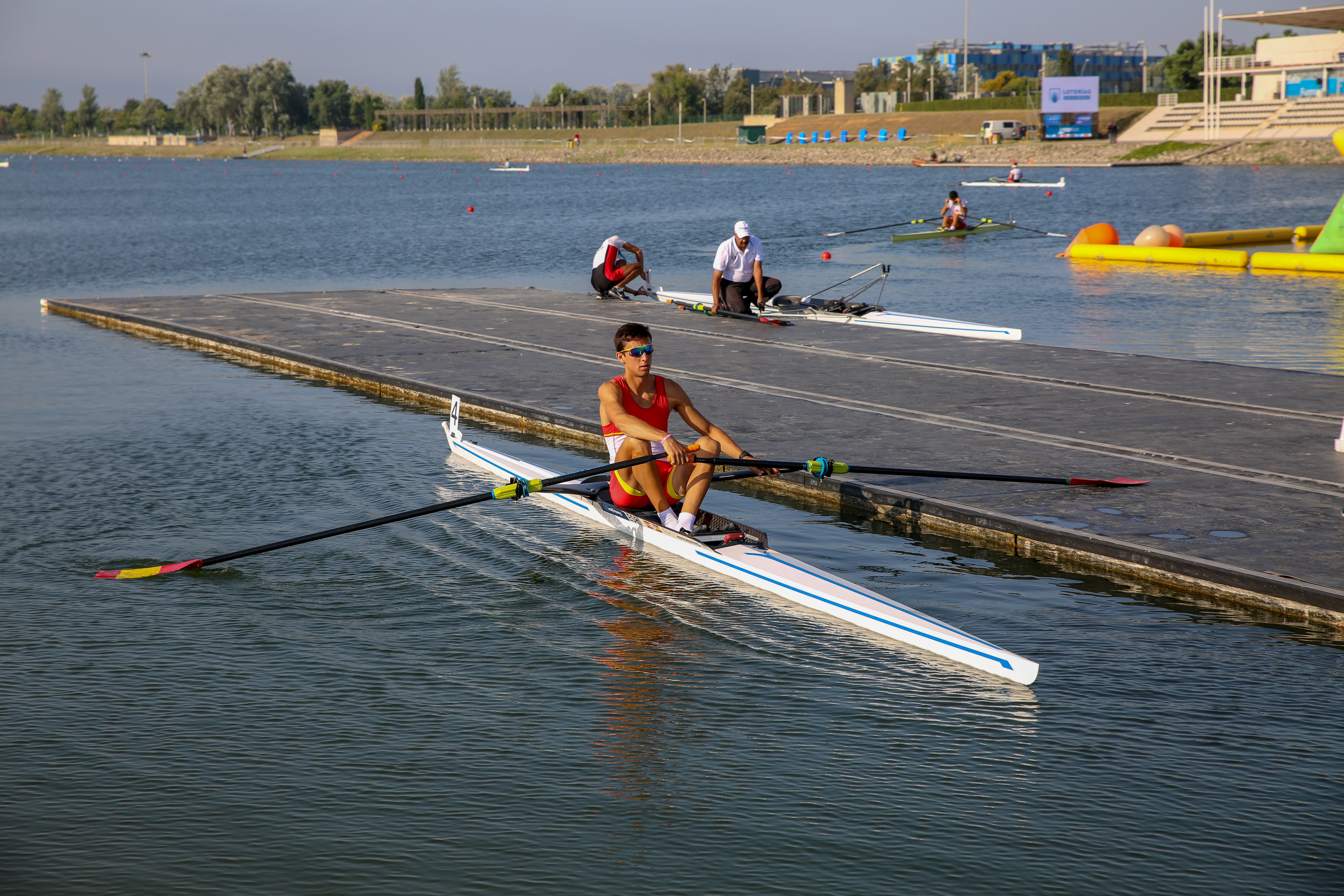 Alejandro Vera en los Juegos del Mediterráneo 2018